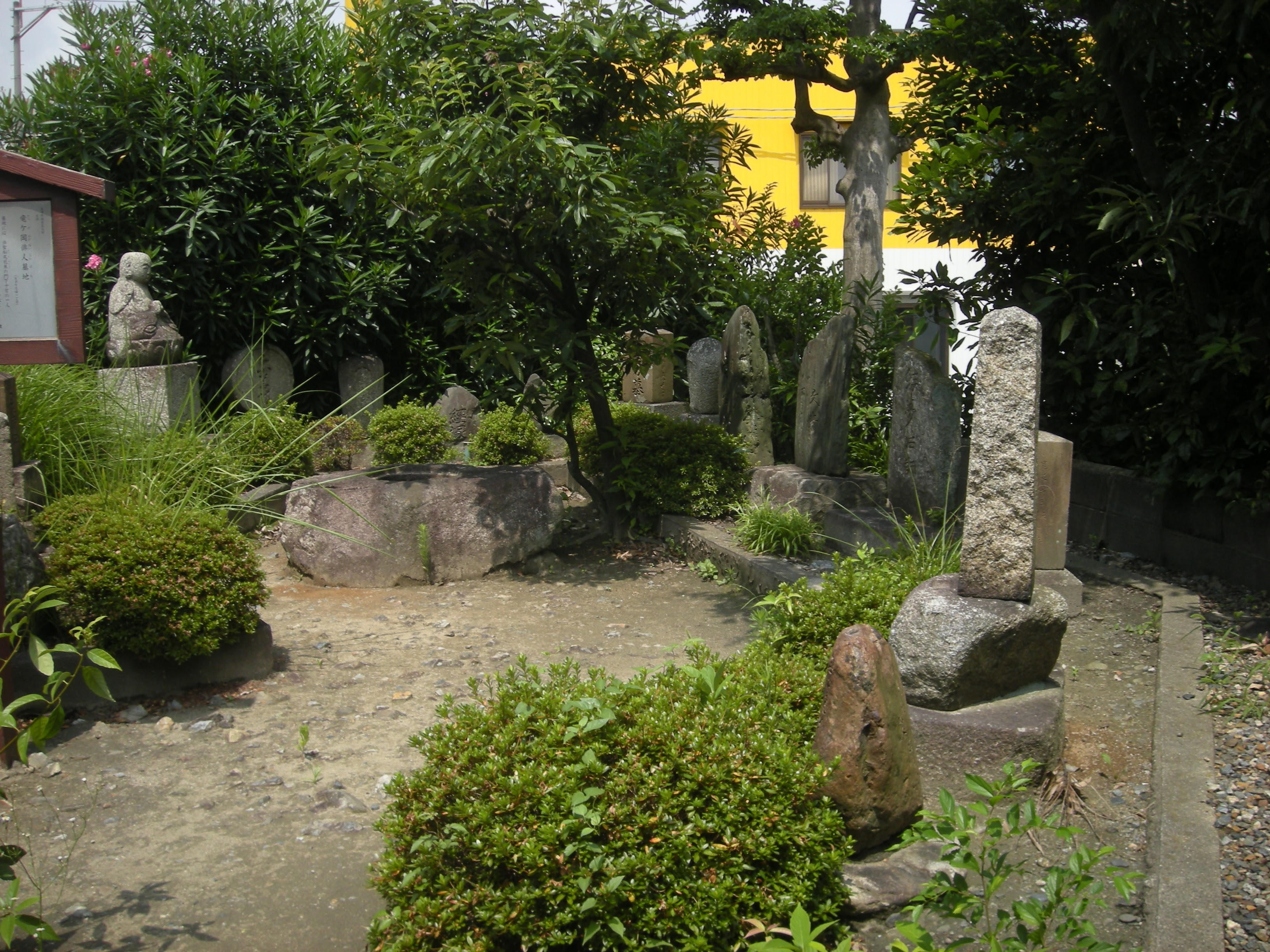 内藤丈草仏幻庵跡